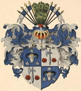 Baggehufwudti suguvõsa aadlivapp